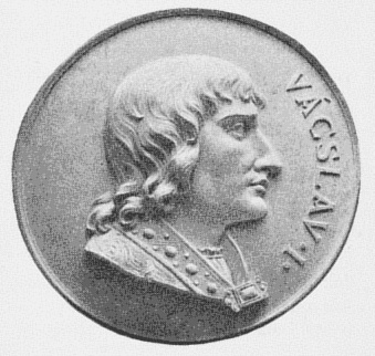 Návrh medailonu pro schodiště muzea zobrazující krále Václava I.